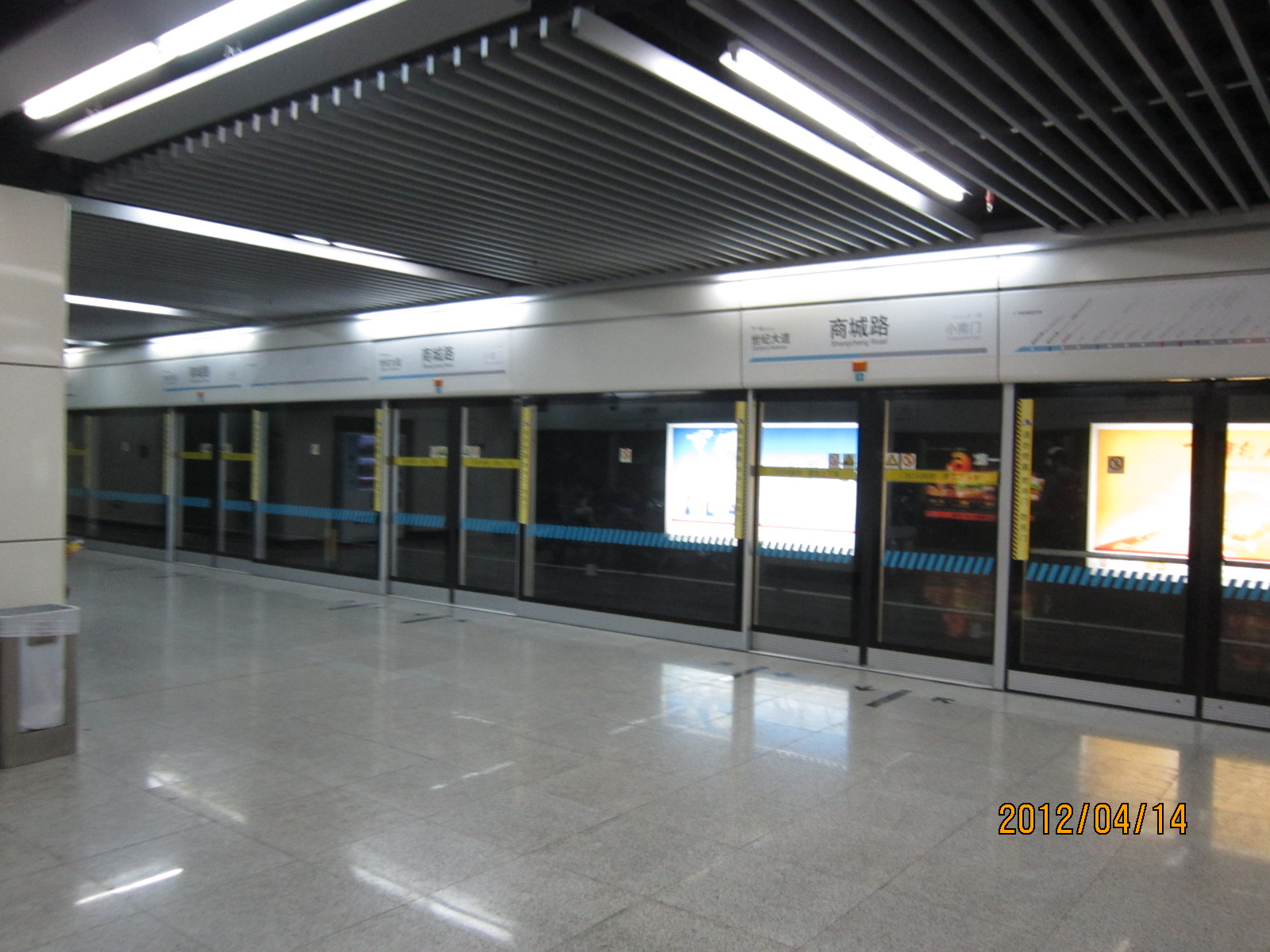 中文（中国大陆）: 上海轨道交通9号线商城路站站台